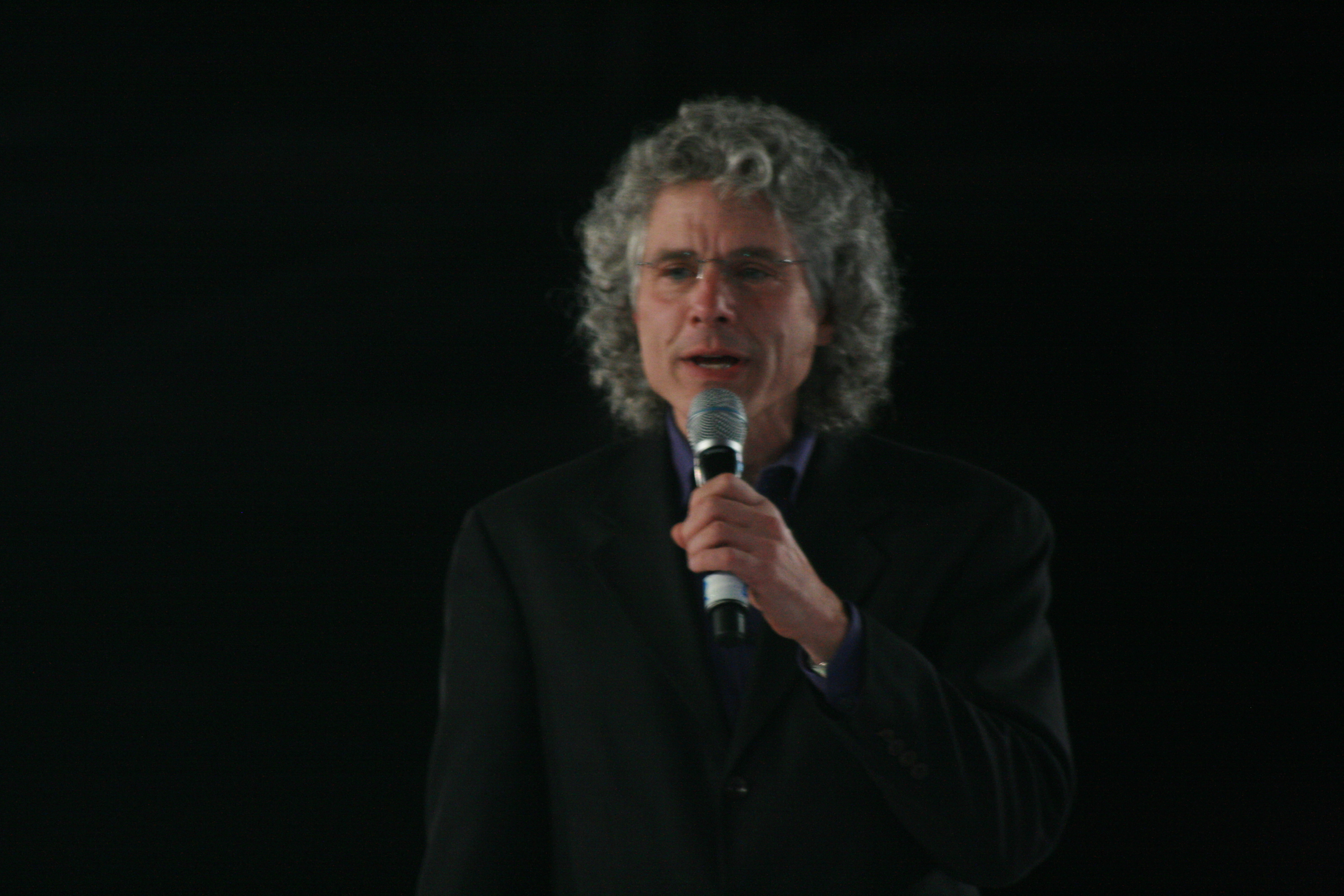 Steven Pinker en la Ciudad de las Ideas 2008. Cynosura